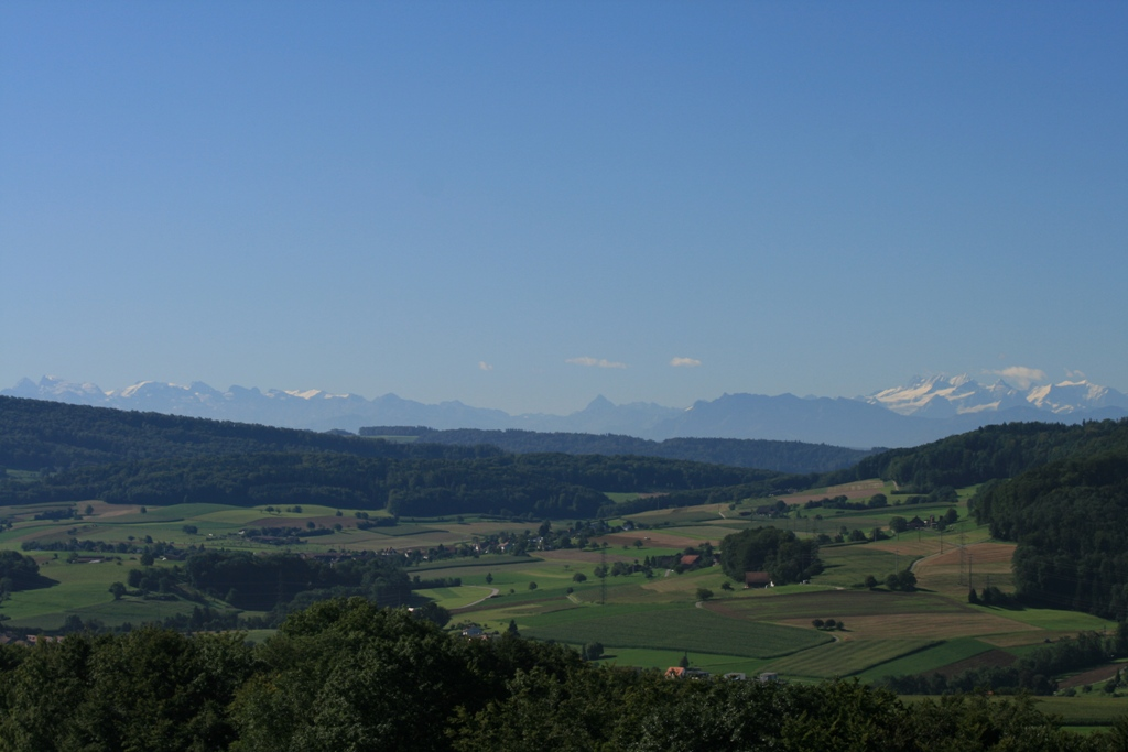 Blick auf Freienwil, Aargau, Schweiz